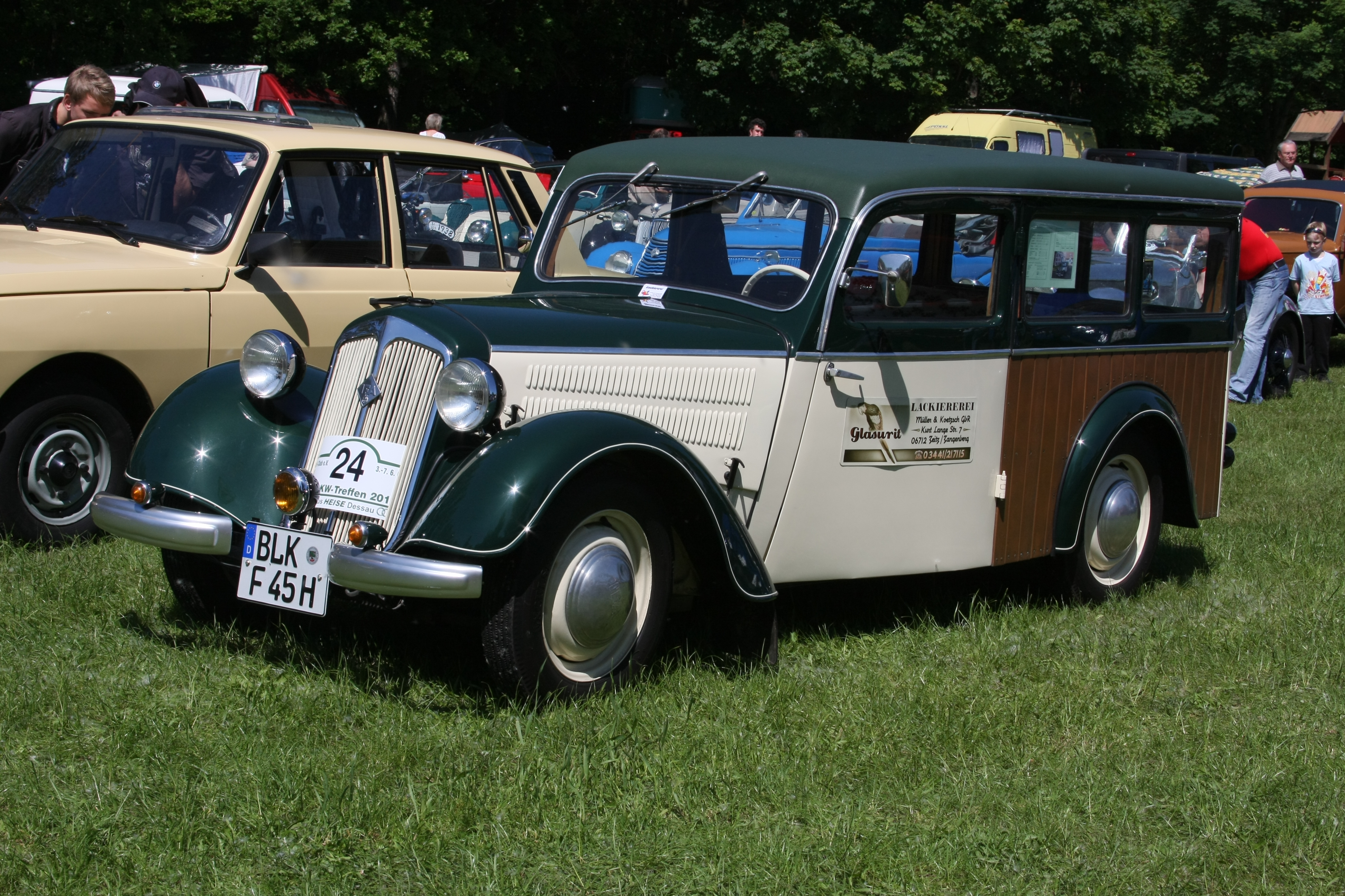 34. DKW-Treffen in Garitz 2010